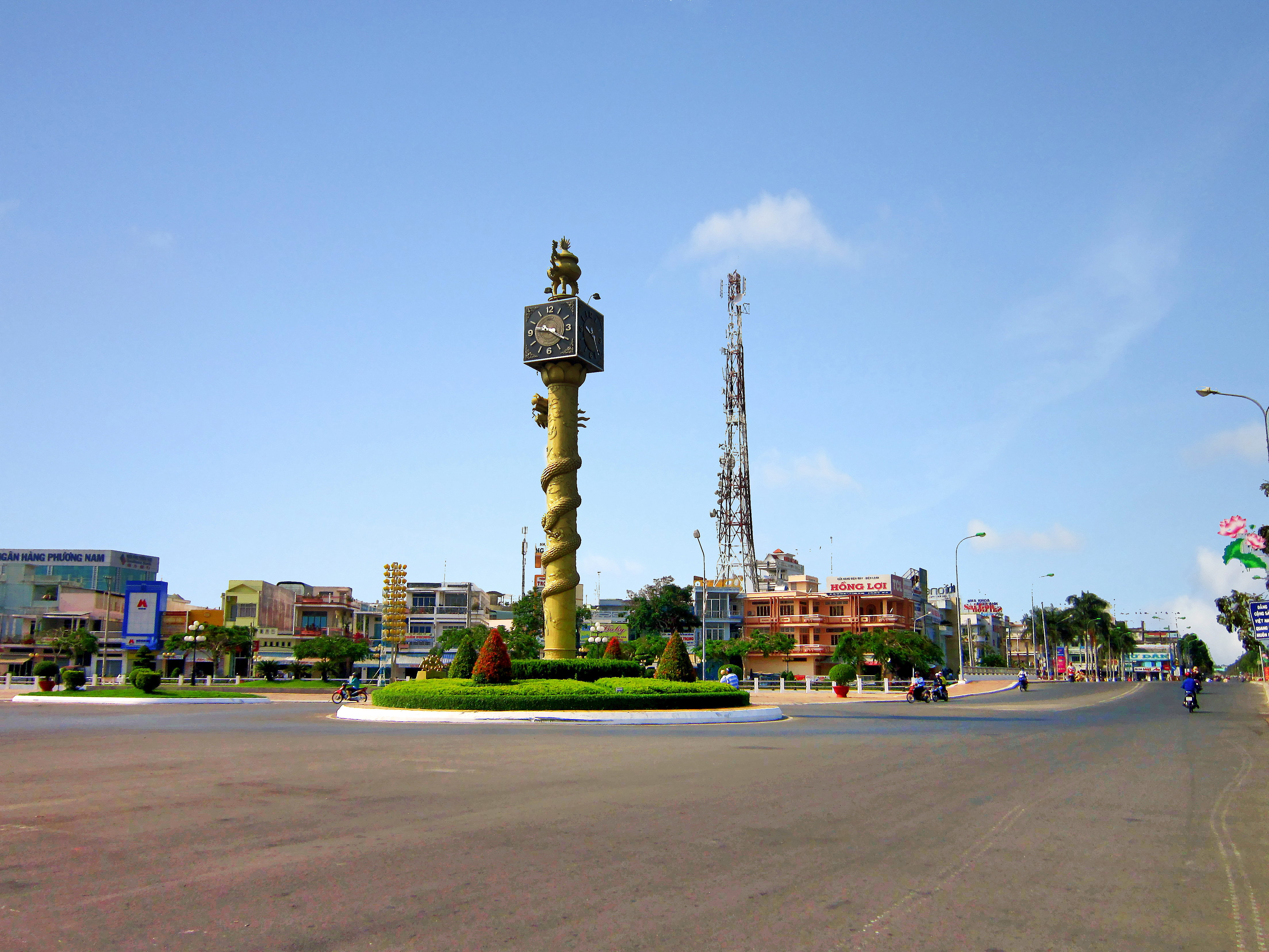 Tháp Đồng Hồ ở trung tâm TP Vị Thanh, tỉnh Hậu Giang, Việt Nam.